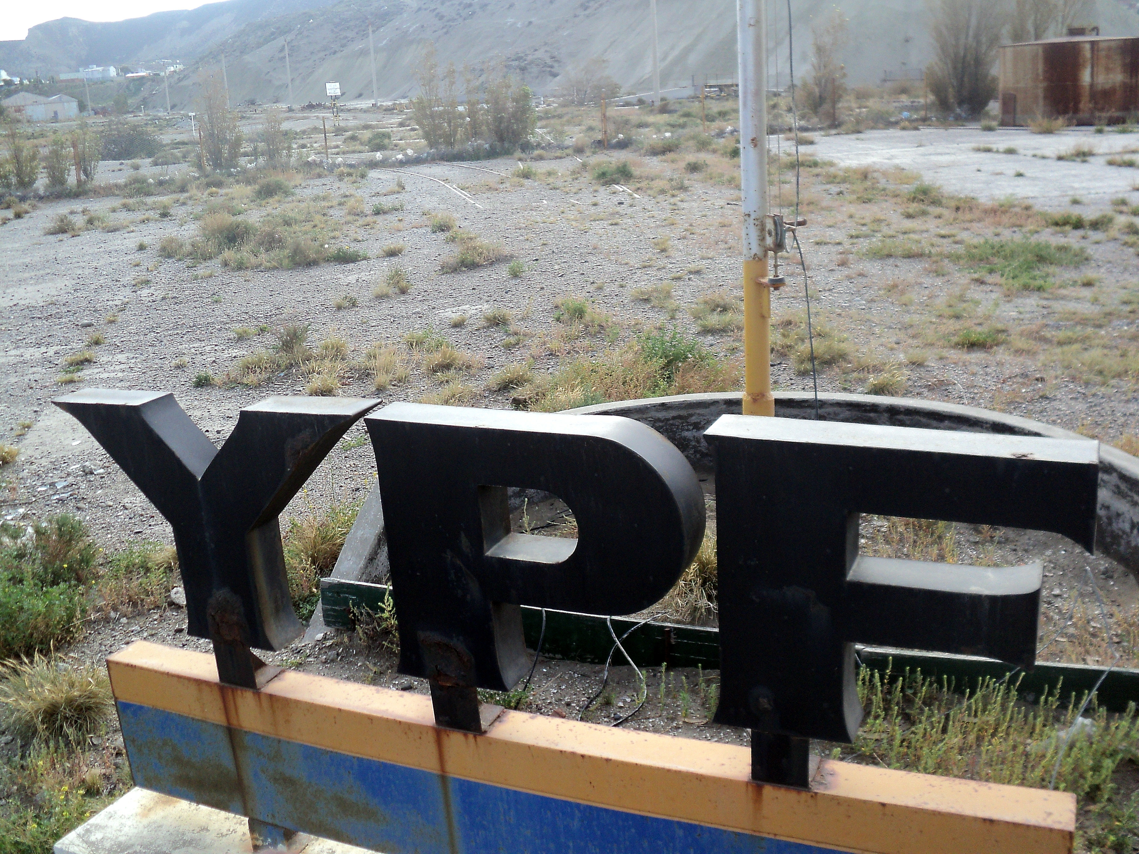 Cartel de entrada al predio, de la época de Repsol